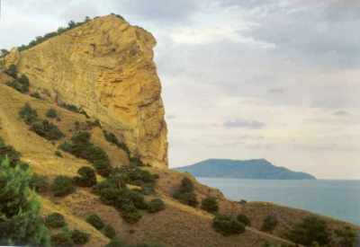 Новий Світ (автономна республіка Крим). Мис Орел. Вдалині - мис Меганом (зверніть увагу - його профіль справді нагадує жінку, що лежить на спині). 20.09.2002 р.